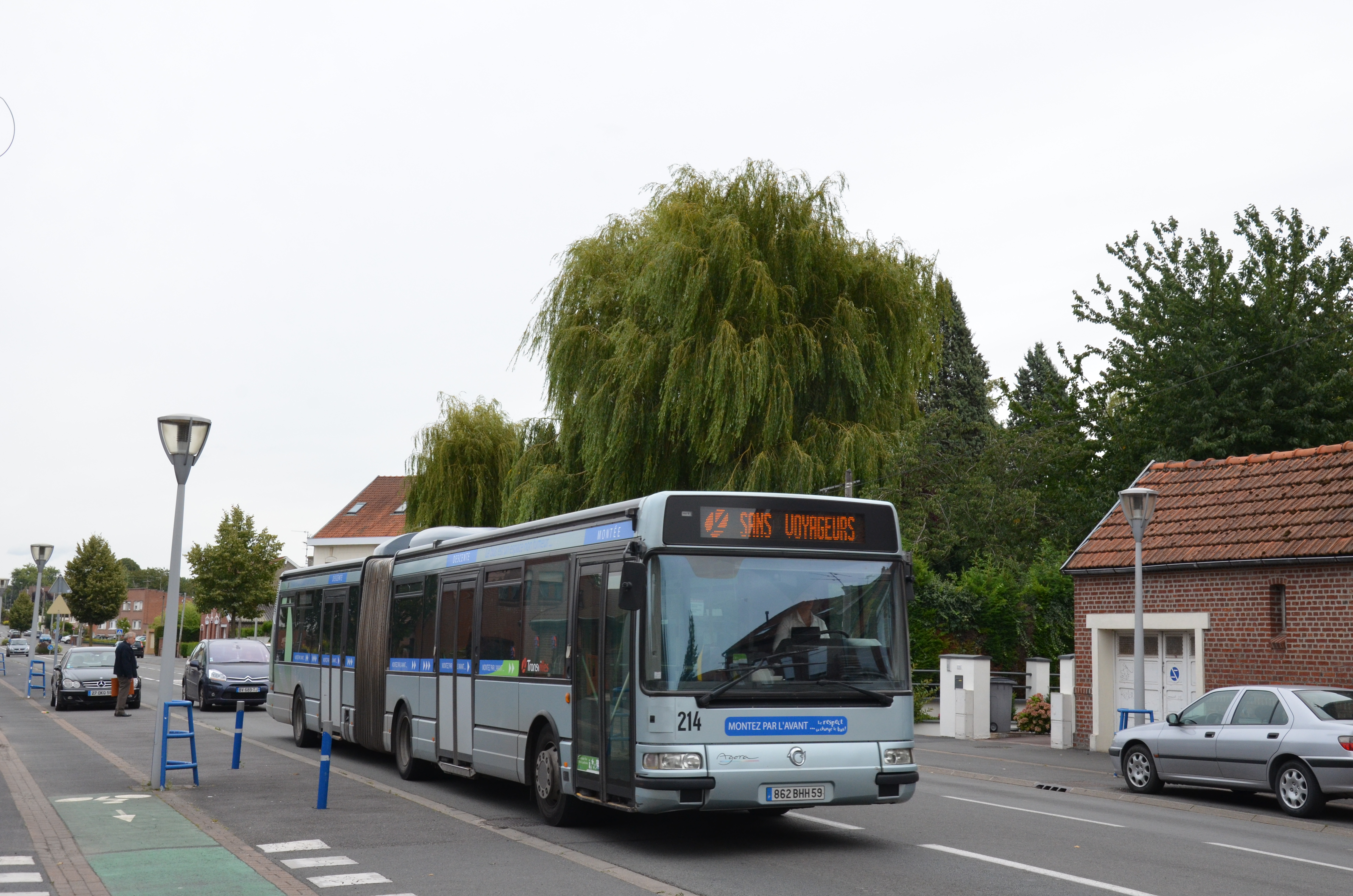 Irisbus Agora L n°214 du réseau TRANSVILLES de Valenciennes, rentrant au dépôt de Saint-Saulve.